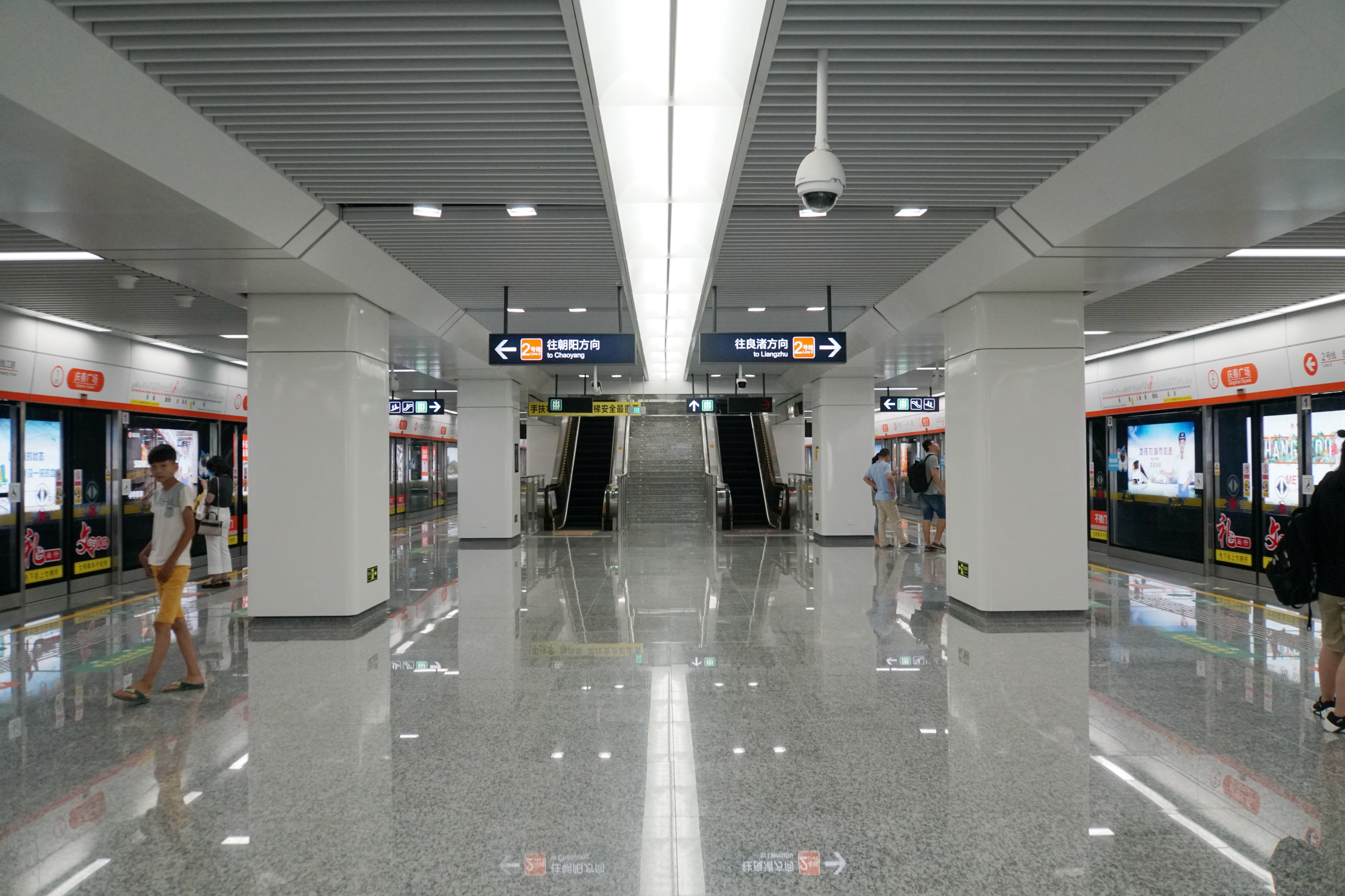 庆春广场站站台